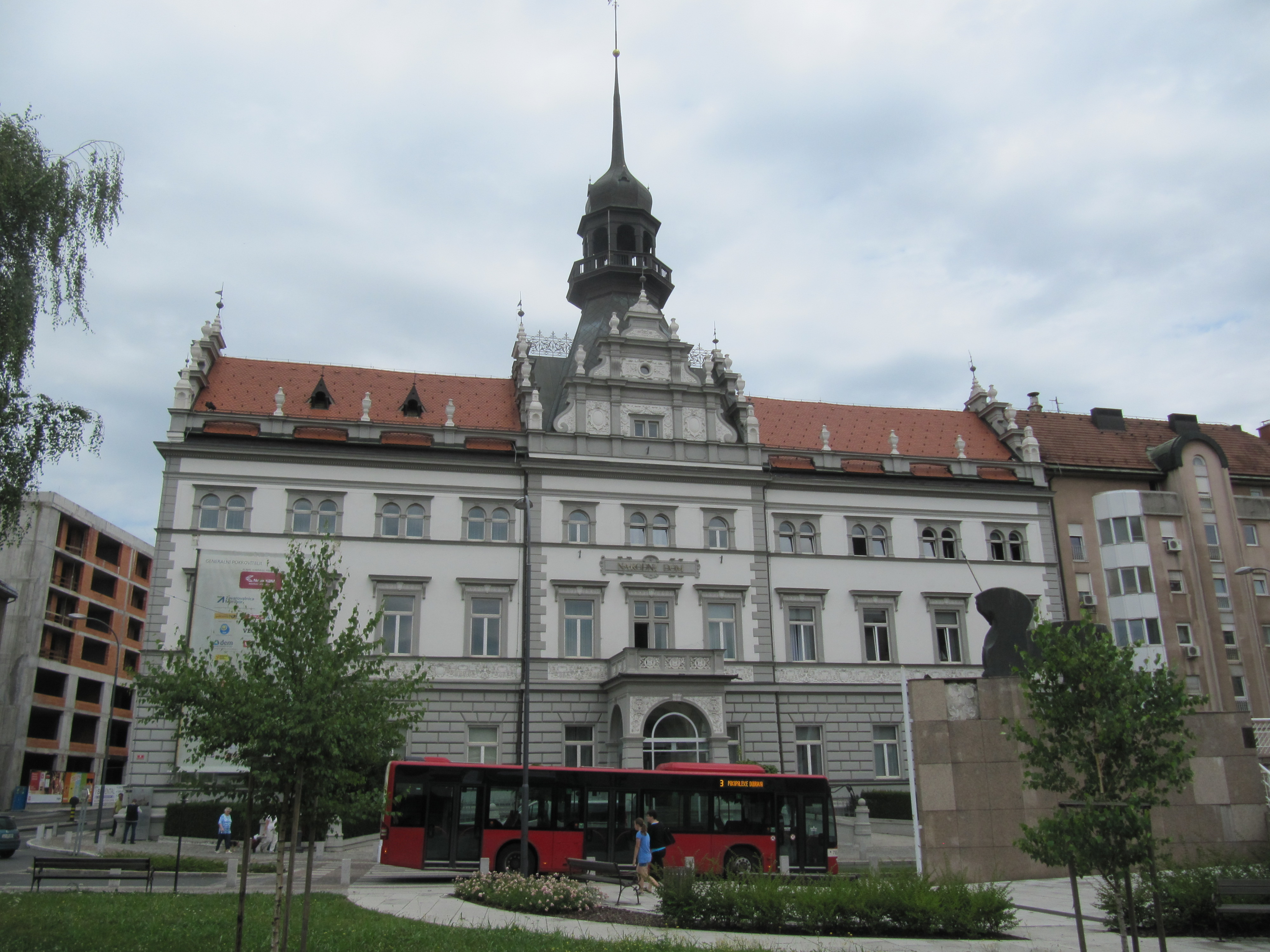 Kulturno prireditveni center narodni dom Maribor